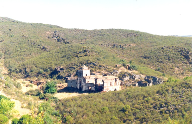 Convento da Tomina, Sto Aleixo, Alentejo, Portugal. Autor; Silvestre Luis Varela Raposo